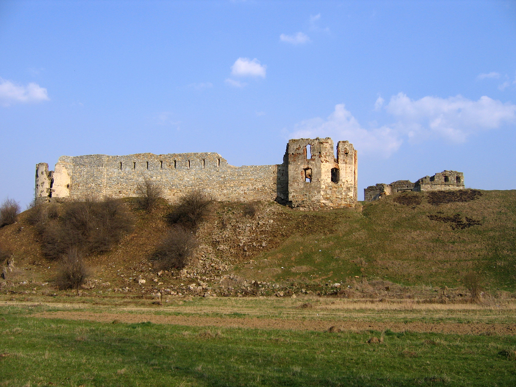 Замок, Пнів